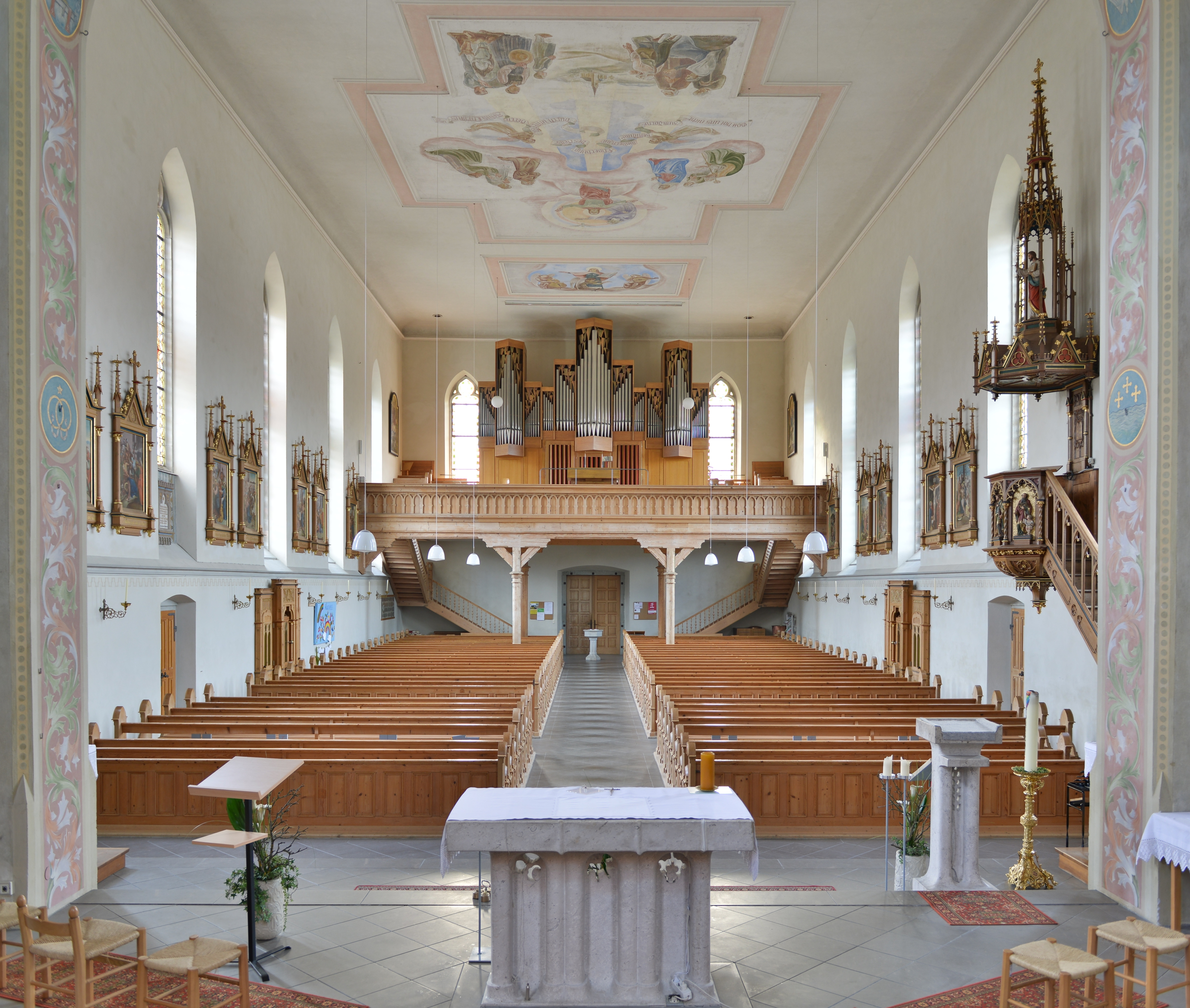 Pfarrkirche hl. Nikolaus von Egg (Vorarlberg), 1890-1892 Neubau nach Plänen von Anton Gamperle durch Baumeister Fidel Kröner. Rieger Orgel von 1964.